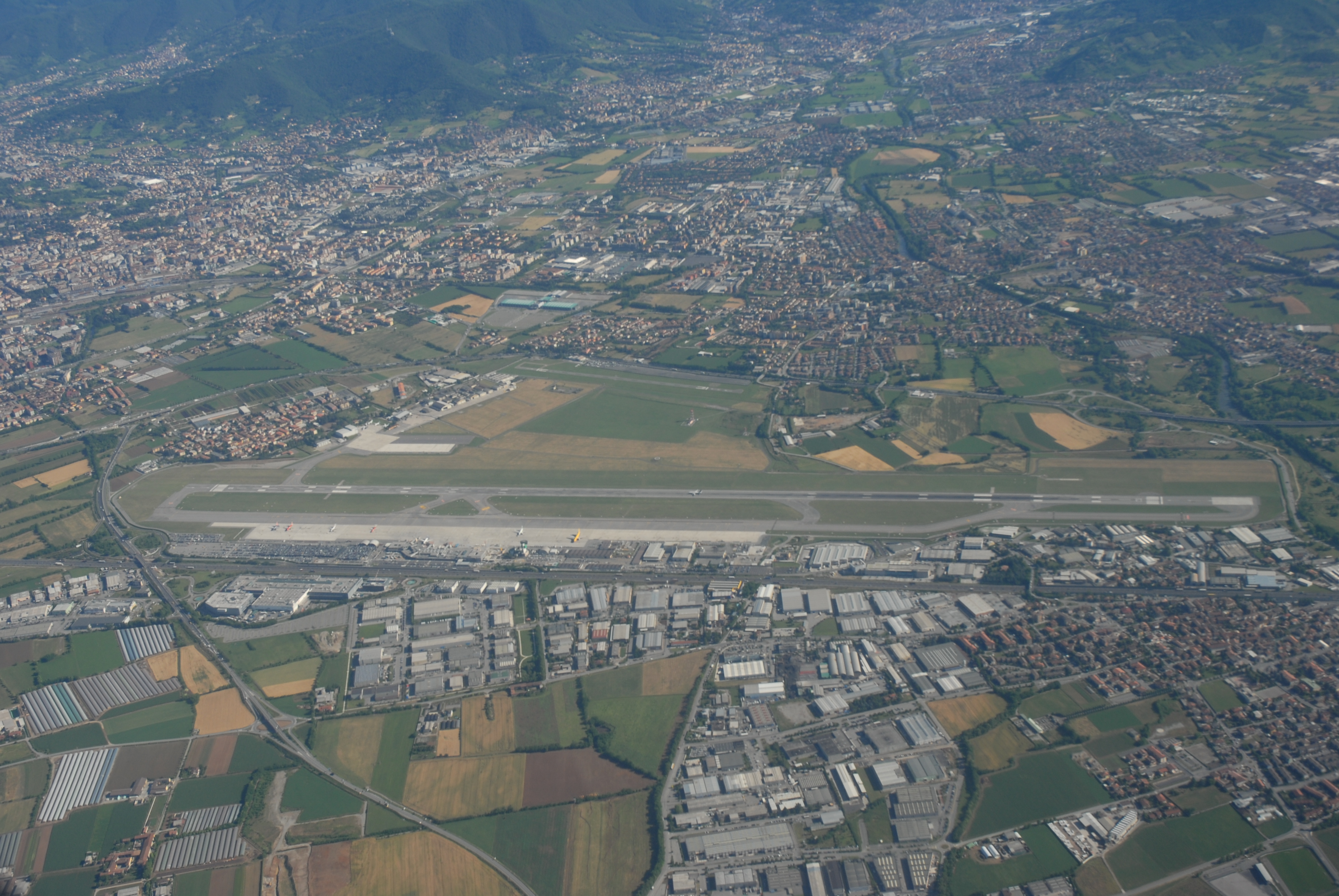 Veduta aerea dell'Aeroporto di Bergamo-Orio al Serio